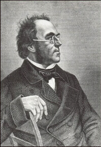 Portrait Joseph Meyers